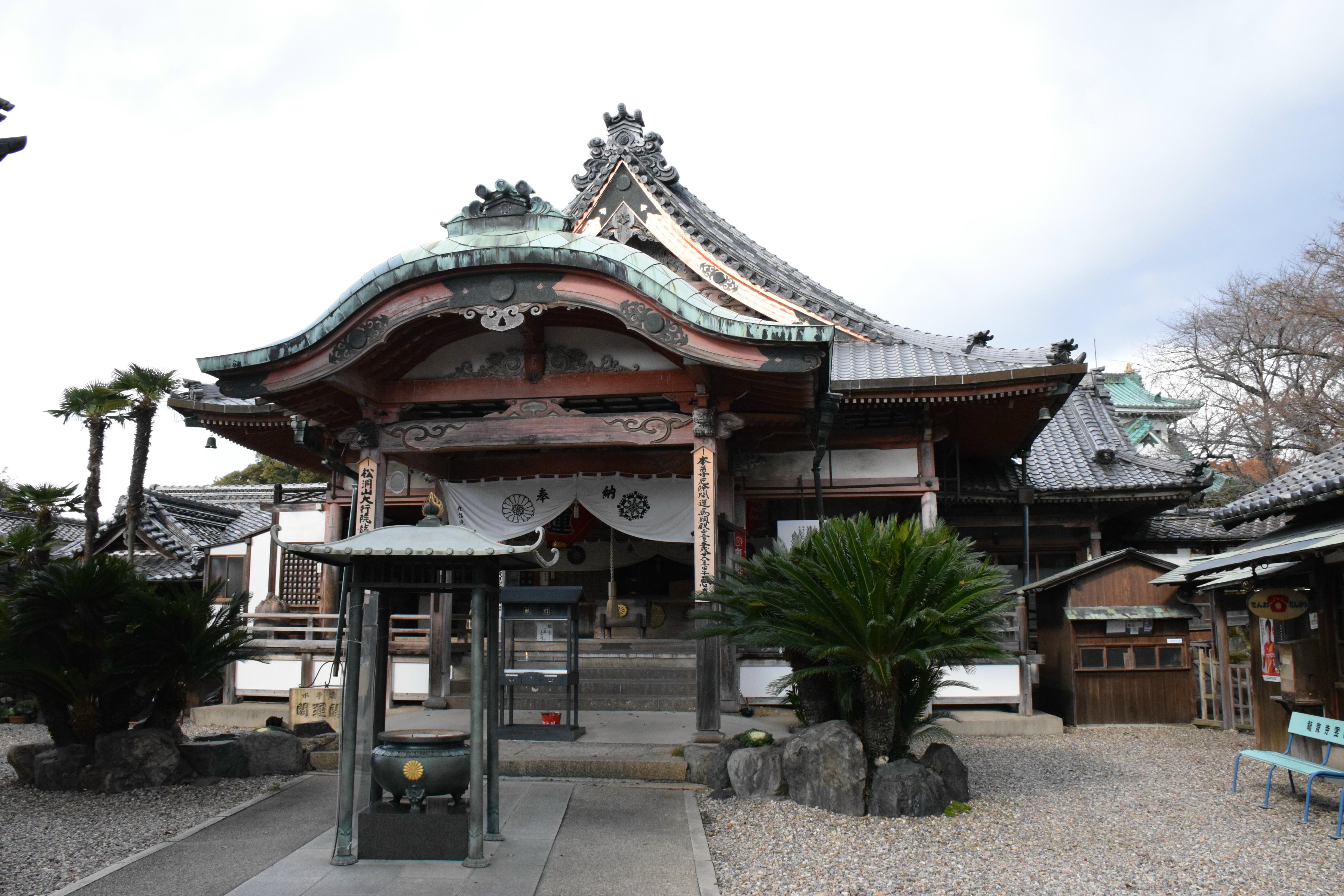 龍泉寺本堂